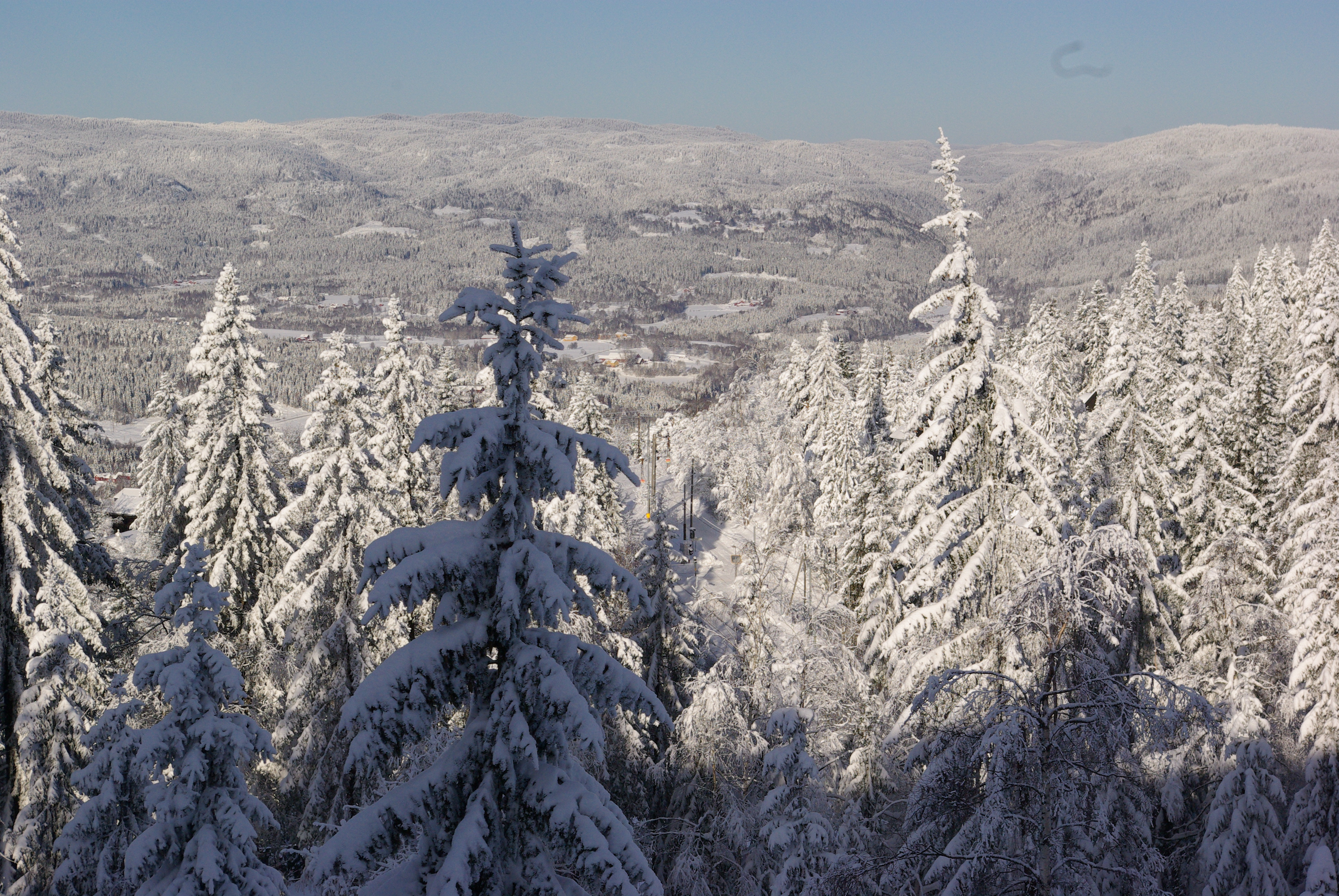 Orreskogen vinterlandskap frå Lysebu